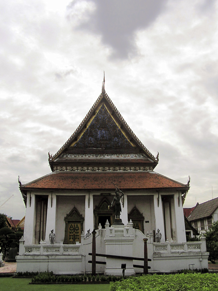 Puttisawan Hall, Bangkok National Museum, Bangkok , Thailand